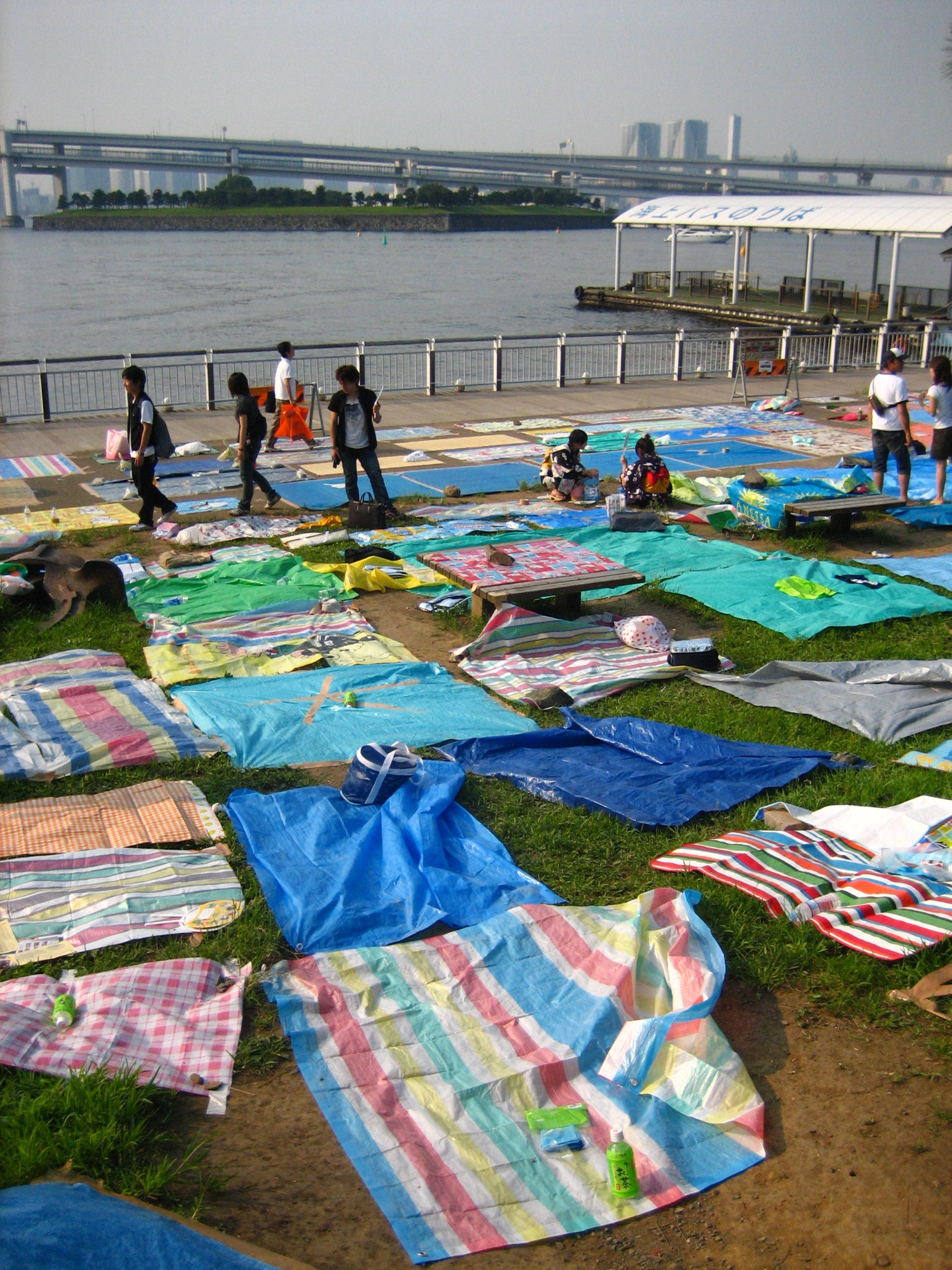 Calor bochornoso... un plan... irse a la isla de los centros comerciales y montar un picnic